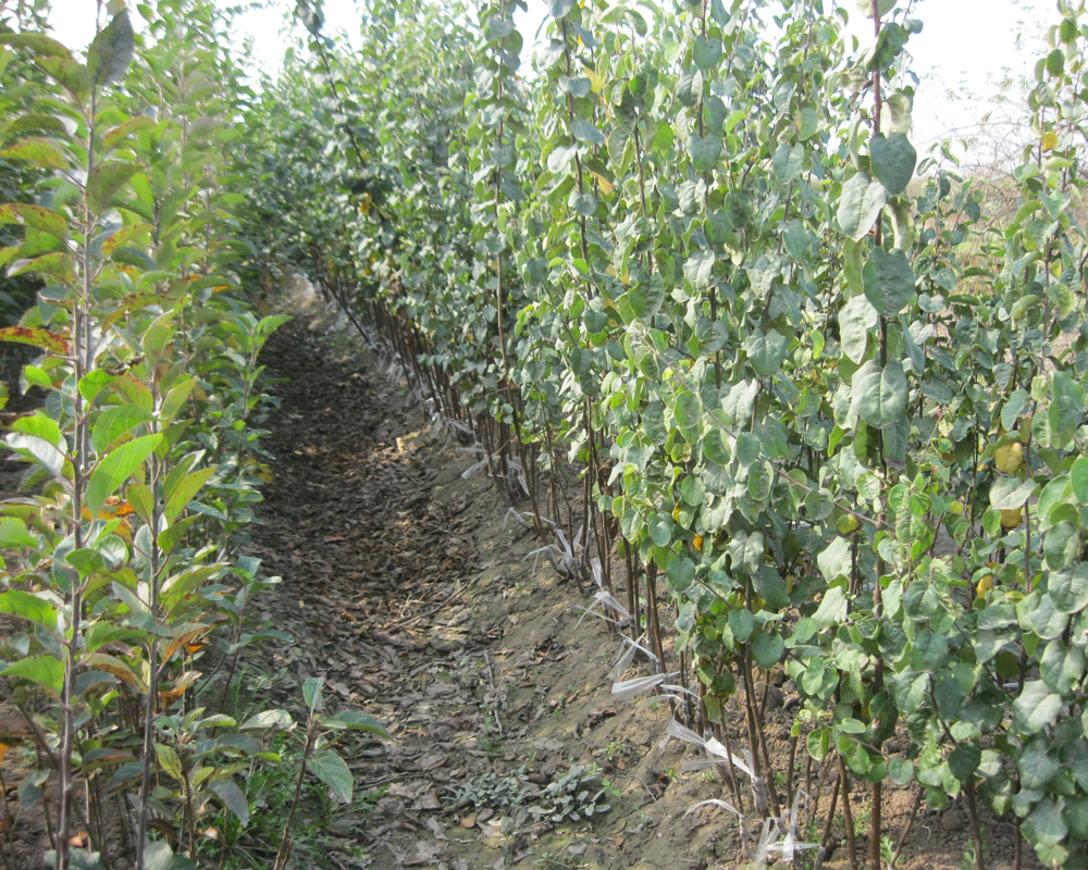 окулянты айвы заокулированы местными сортами народной селекции.